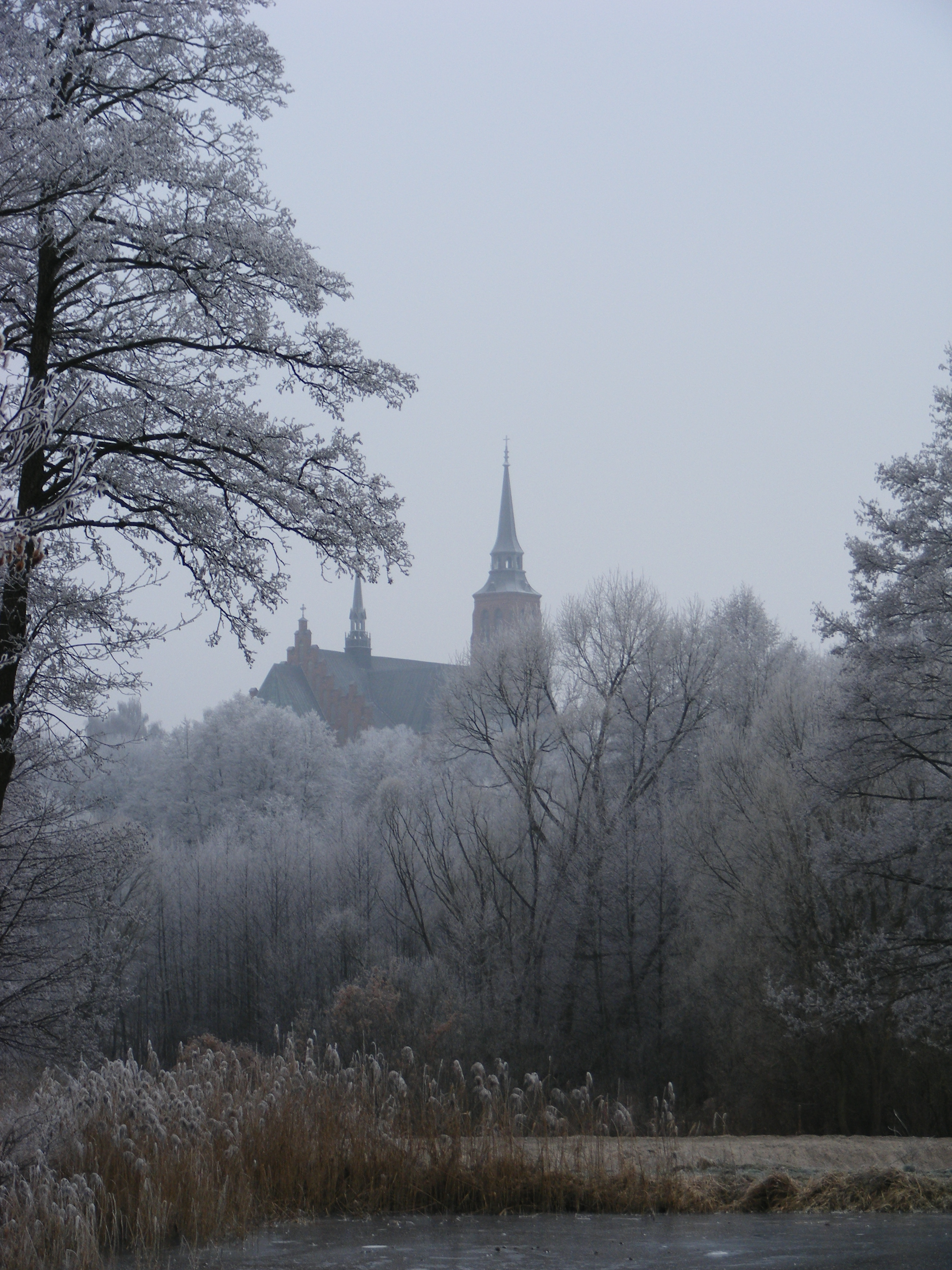 Kościół Wniebowzięcia NMP od strony Izydorów.